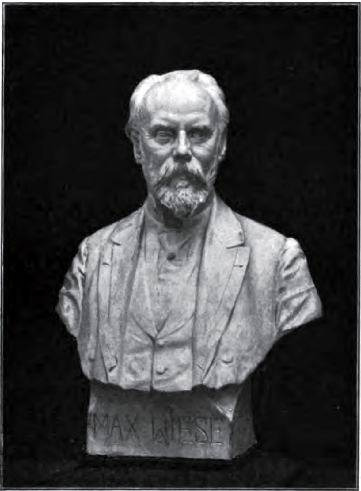 Büste des Max Wiese (1846-1925), Bildhauer, Neuruppin, Brandenburg, Deutschland